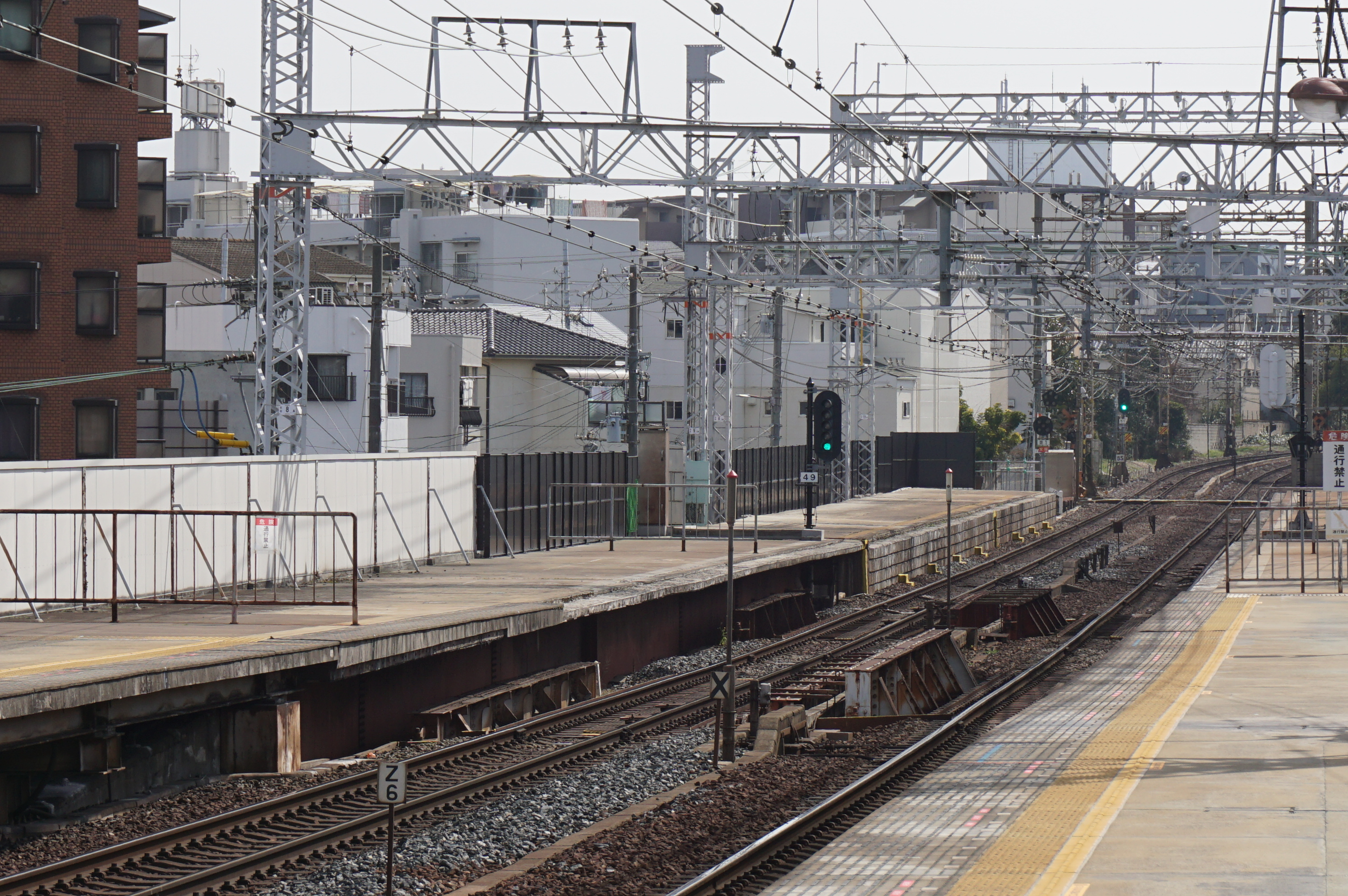 高架化前に使われていた旧ホームの跡 Sony ILCE-6000